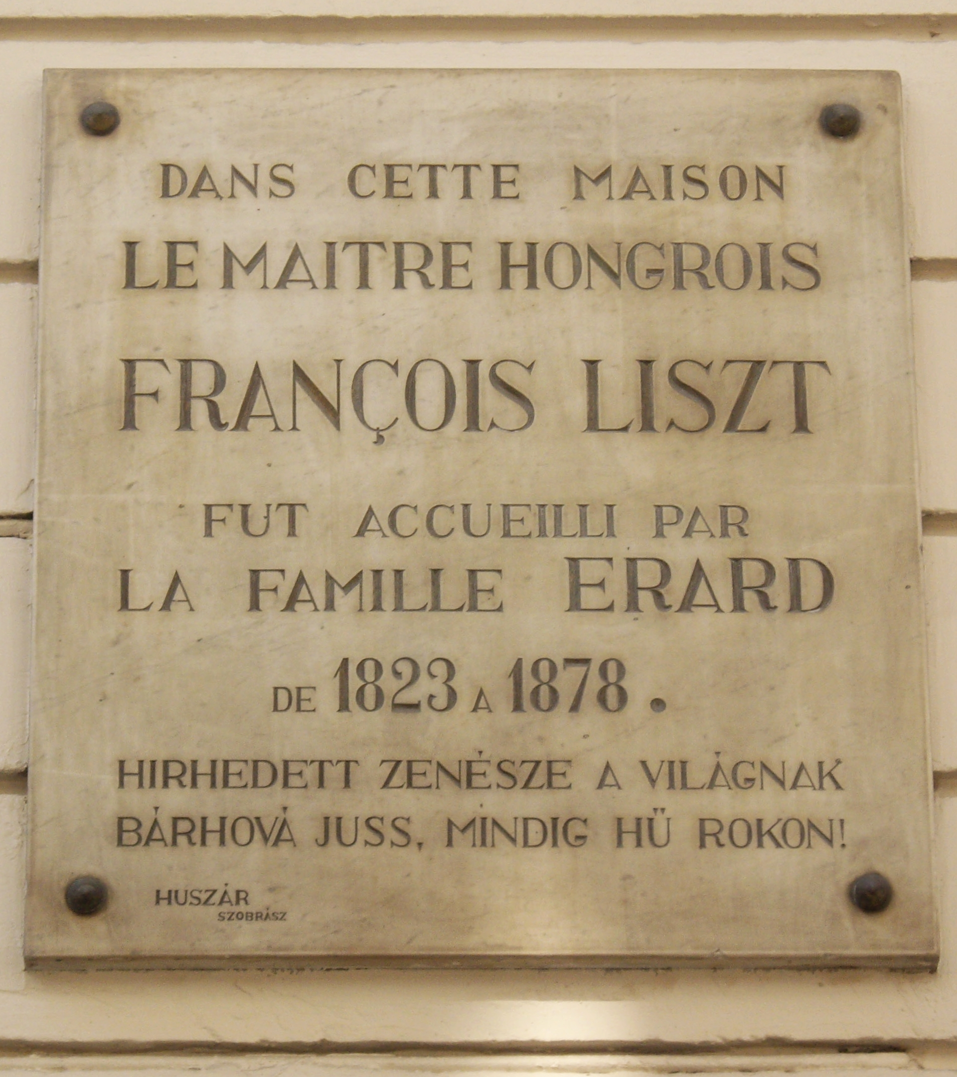 Plaque apposée au n° 11 de la rue du Mail, Paris 2e.« Dans cette maison, le maître hongrois François Liszt fut accueilli par la famille Érard de 1823 à 1878.Hírhedett zenésze a világnak,Bárhová juss, mindig hű rokon! »NoteLe texte en hongrois est une citation des deux premiers vers de l'ode À Franz Liszt par Mihály Vörösmarty :Musicien renommé, connu de par le monde,Proche et toujours fidèle, où que tu sois !